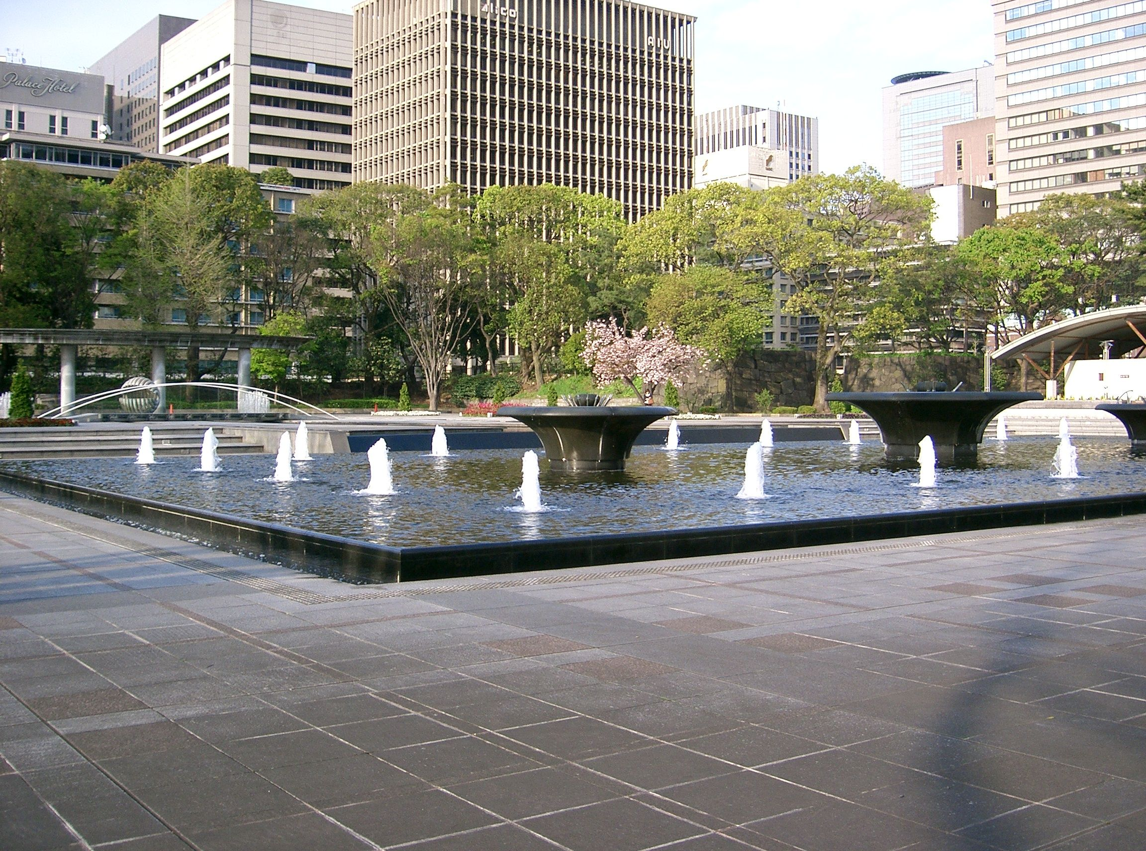 和田倉噴水公園